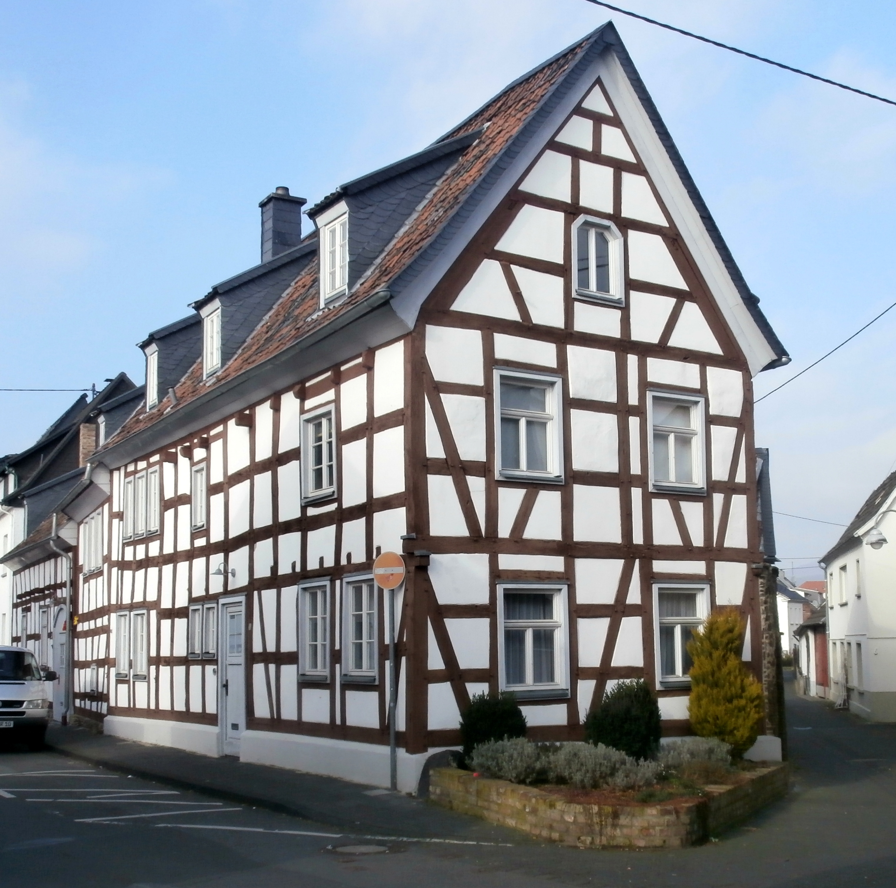 Denkmalgeschützter Streckhof, Rheinstraße 16, Rheinbreitbach